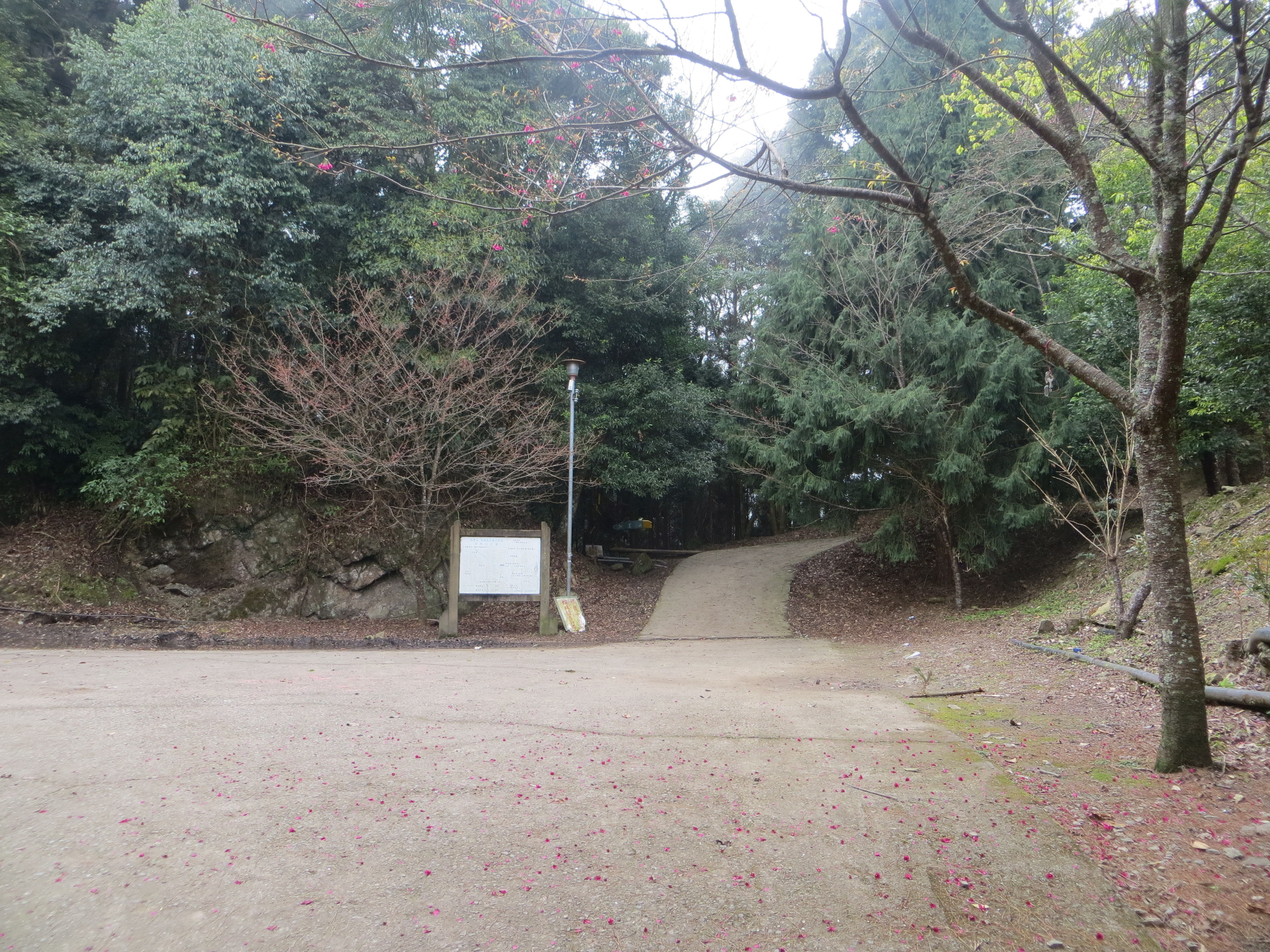 目前登加里山，多行經鹿場部落，依指標沿產業道路至登山口出發。加里山鹿場端登山口有平台可供停車，201年2月11日。